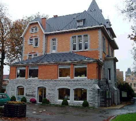 Backside town hall of Zwevegem, West-Flanders, Belgium